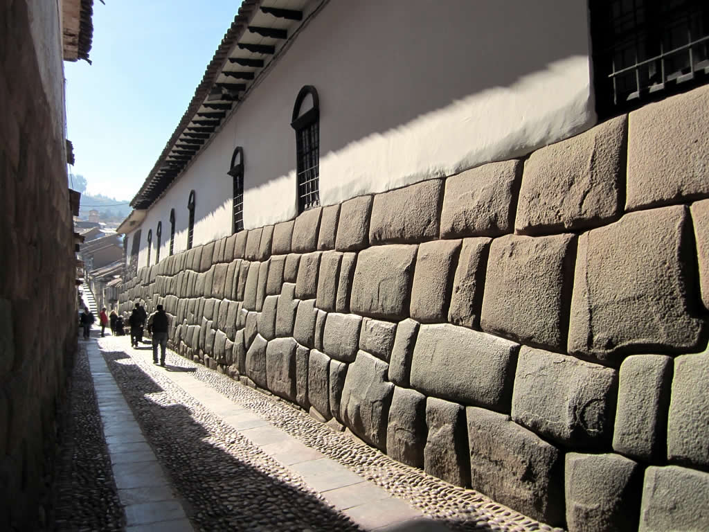 An Inca wall along Hatunrumiyoc in Cuzco, Peru.